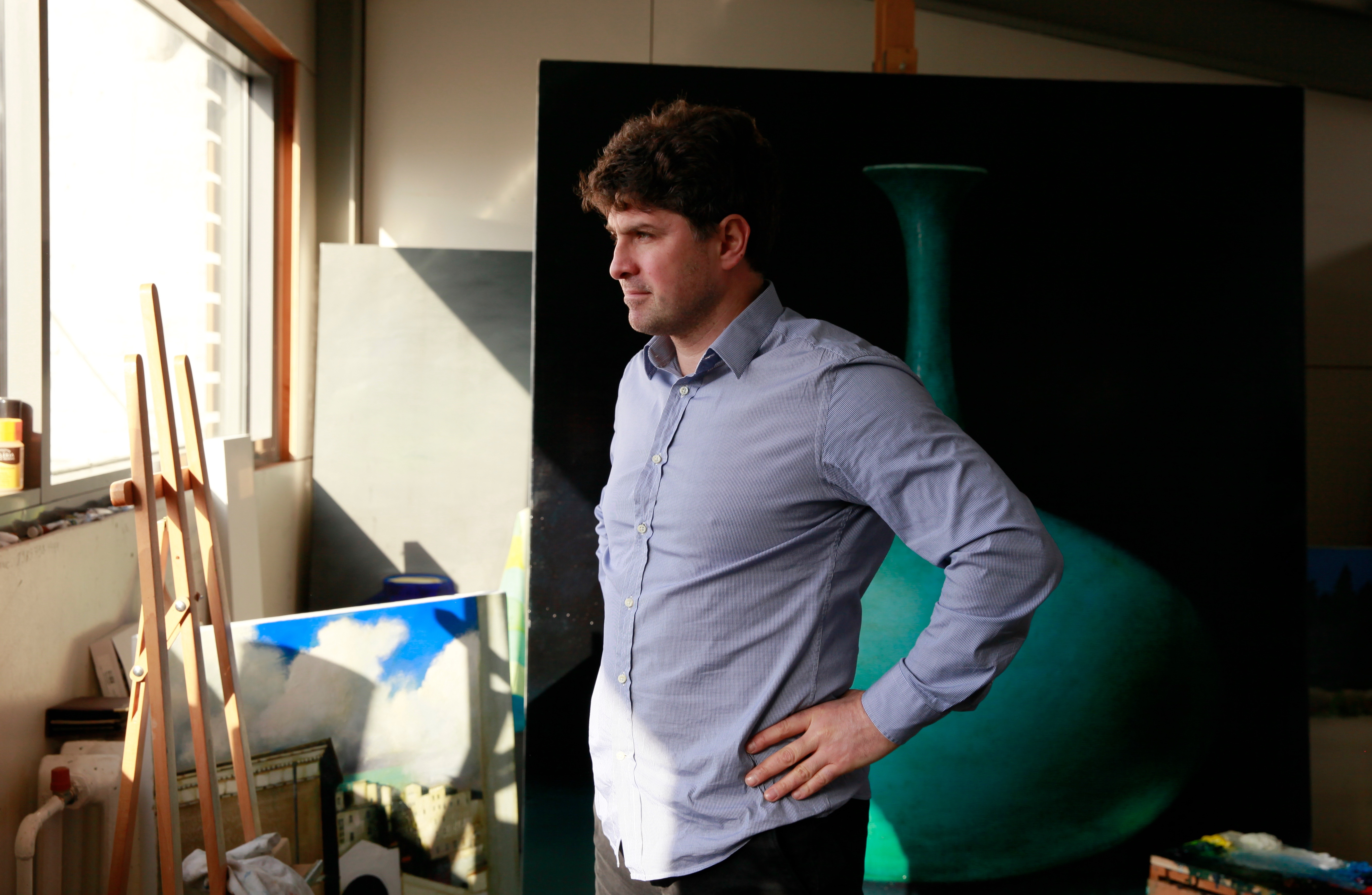 Konstantin Totibadze